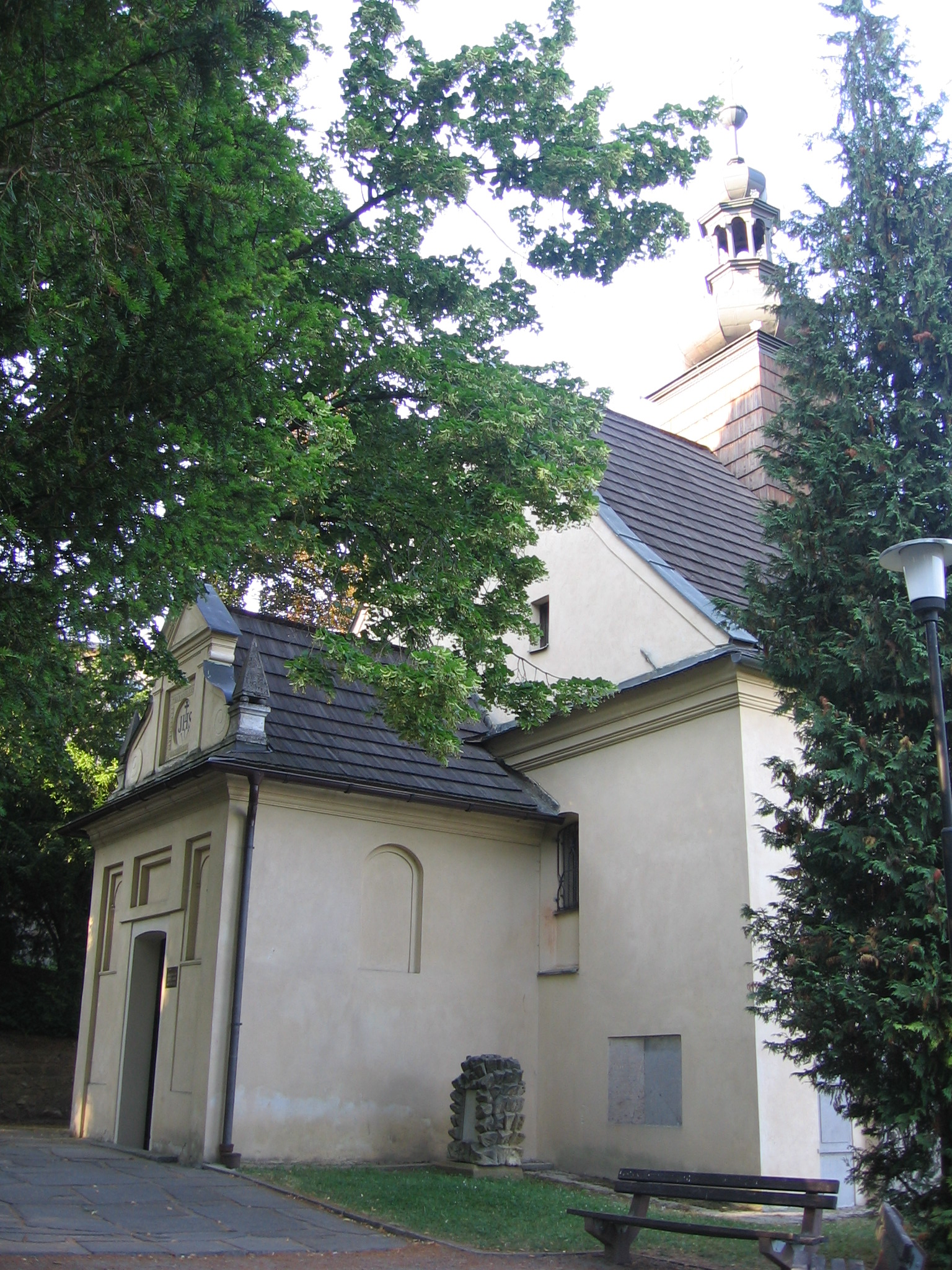 Kostel sv. Jakuba, Na Parkánech, Tábor